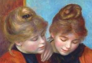 detail Cabeça das duas irmãs em As duas irmãs